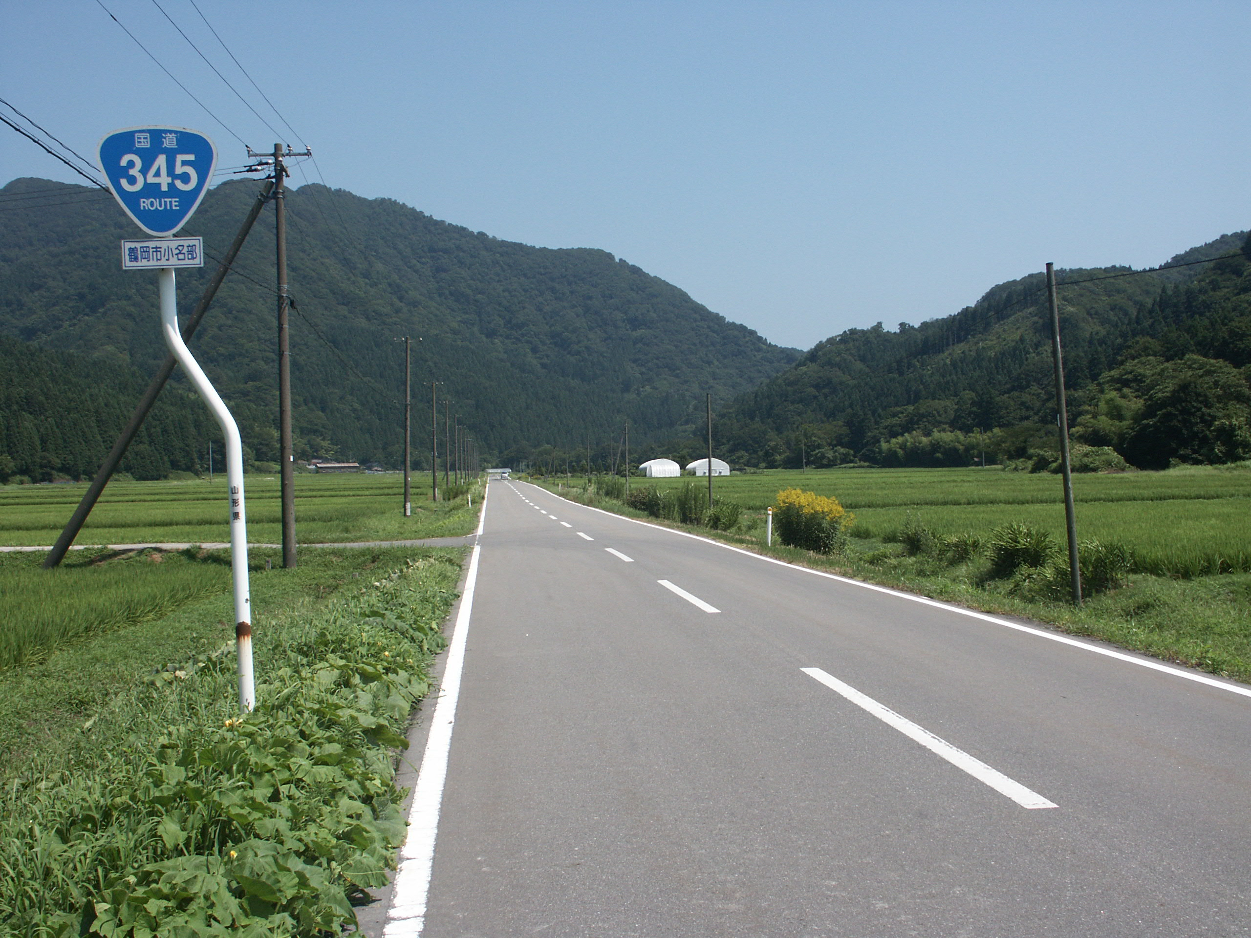 国道345号線山形県鶴岡市小名部付近